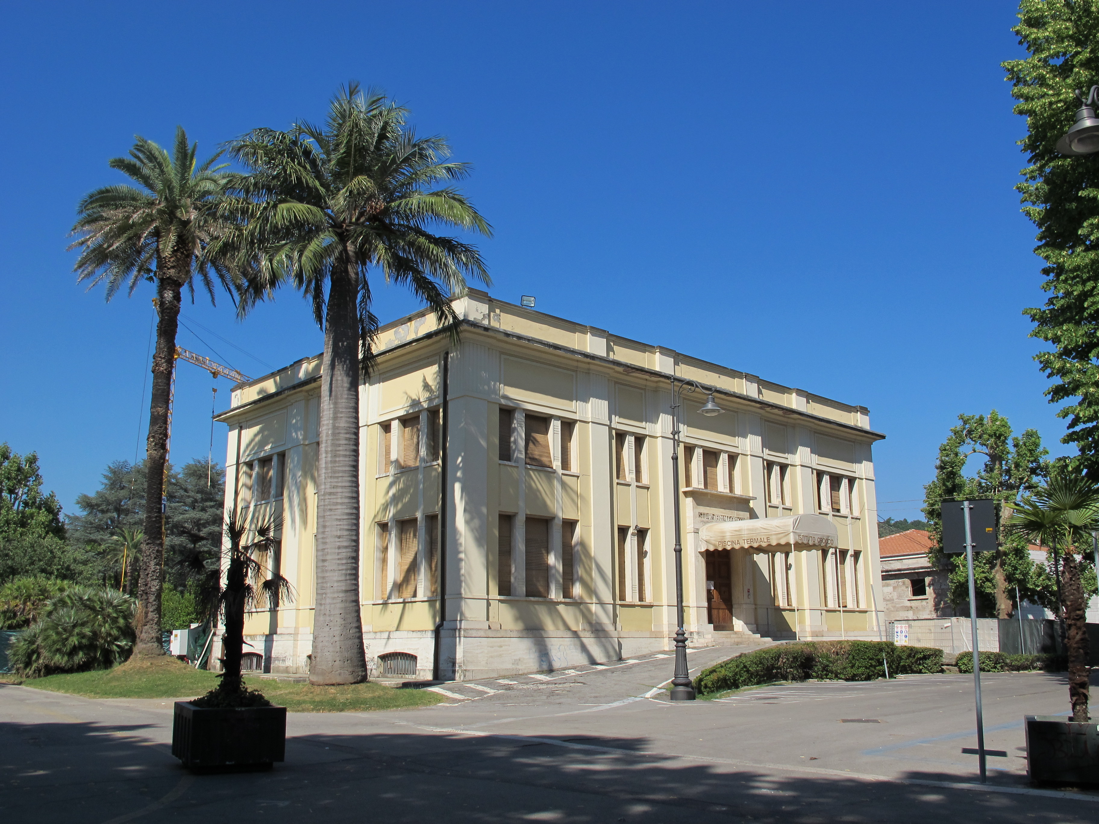 Montecatini, istituto termale grocco